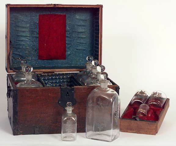 Dette flaskeforet er antakelig fra begynnelsen av 1800-tallet og er innkjøpt fra Ringerike i Buskerud. Det er laget i eik og foret innvendig med ullstoff. Flaskeforet inneholder 6 store flasker, 6 små flasker, 2 store glass og ett drammeglass. Lengde 40.cm. Foto Norsk Folkemuseum, NF.1921-0309AQ.